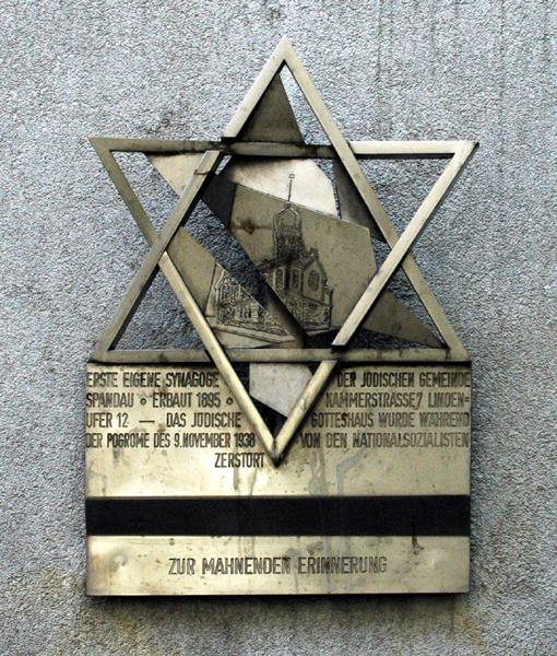 Mahntafel Spandauer Synagoge